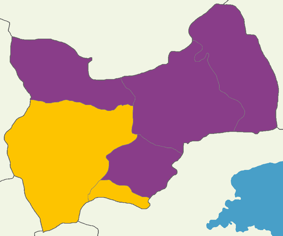 Muş'ta 2014 Türkiye cumhurbaşkanlığı seçimi sonuçları